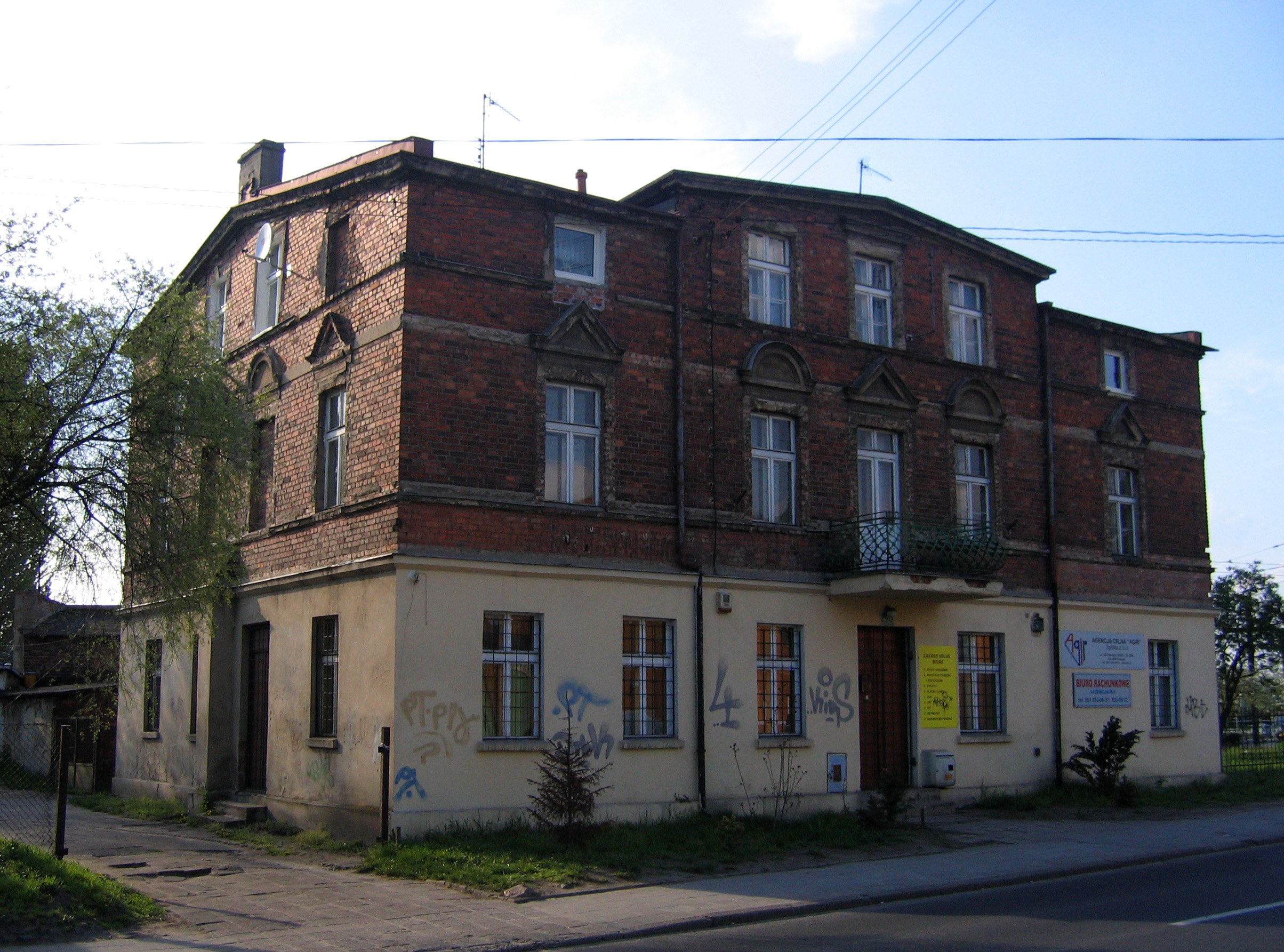 Dom rodziny Trittów na Dębcu, Poznań